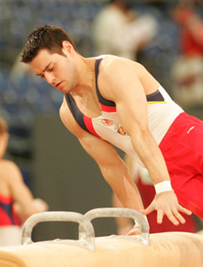 El gimnasta Iván San Miguel en el Campeonato de Europa, en Ámsterdam 2007. Recorte de fotografía original hecha por mí.